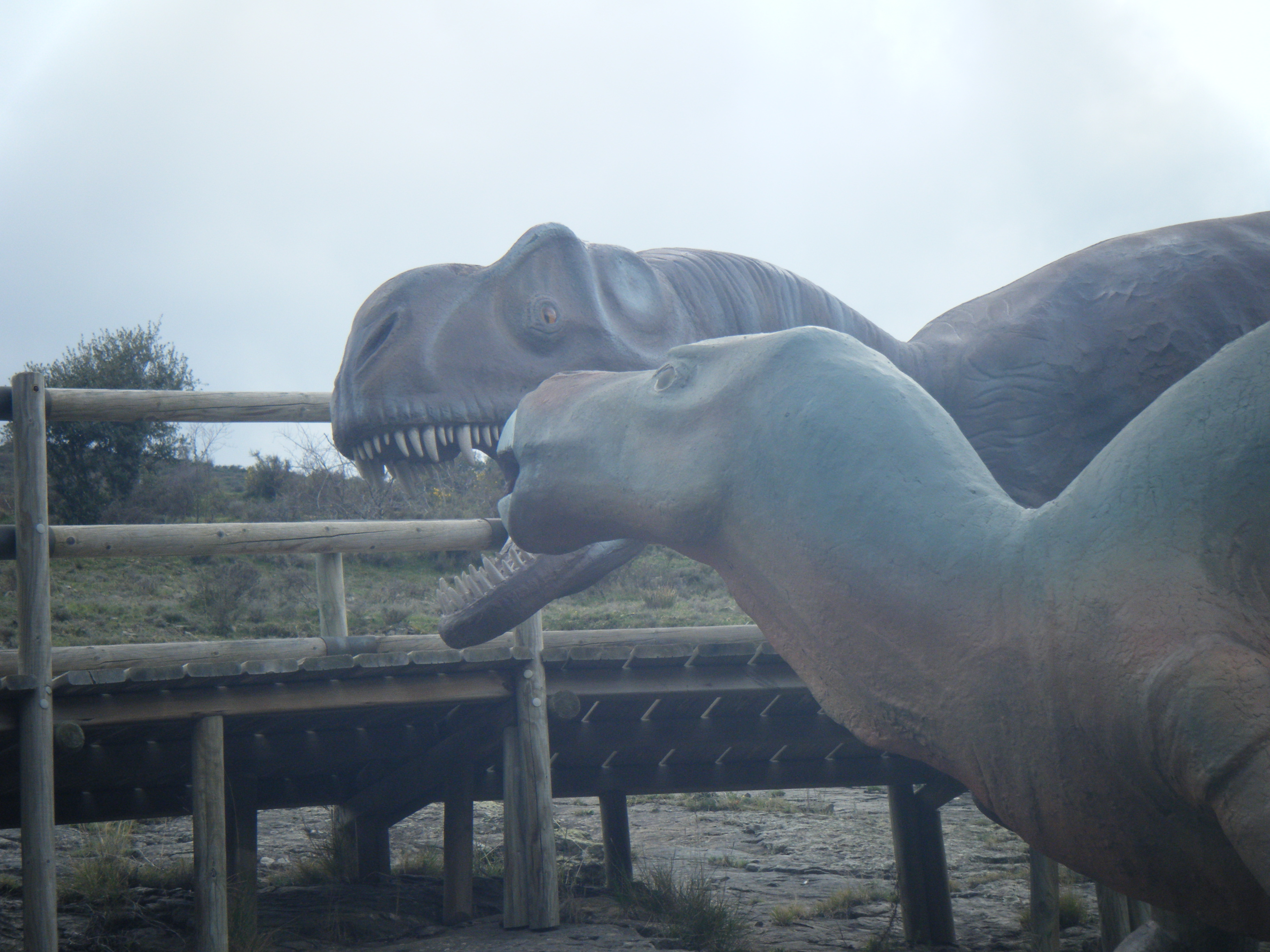 Relicas of two dinosaurs exposed outdoors at Barranco Perdido (Yacimiento de la Virgen del Campo) in Enciso, La Rioja, Spain.